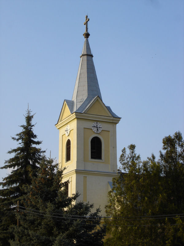 Nógrádmarcal római katolikus temploma, épült 1773-ban